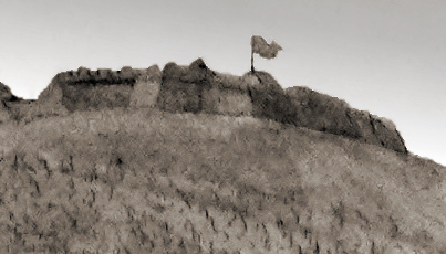 Fort 1 der Befestigungsanlagen auf dem Klüt